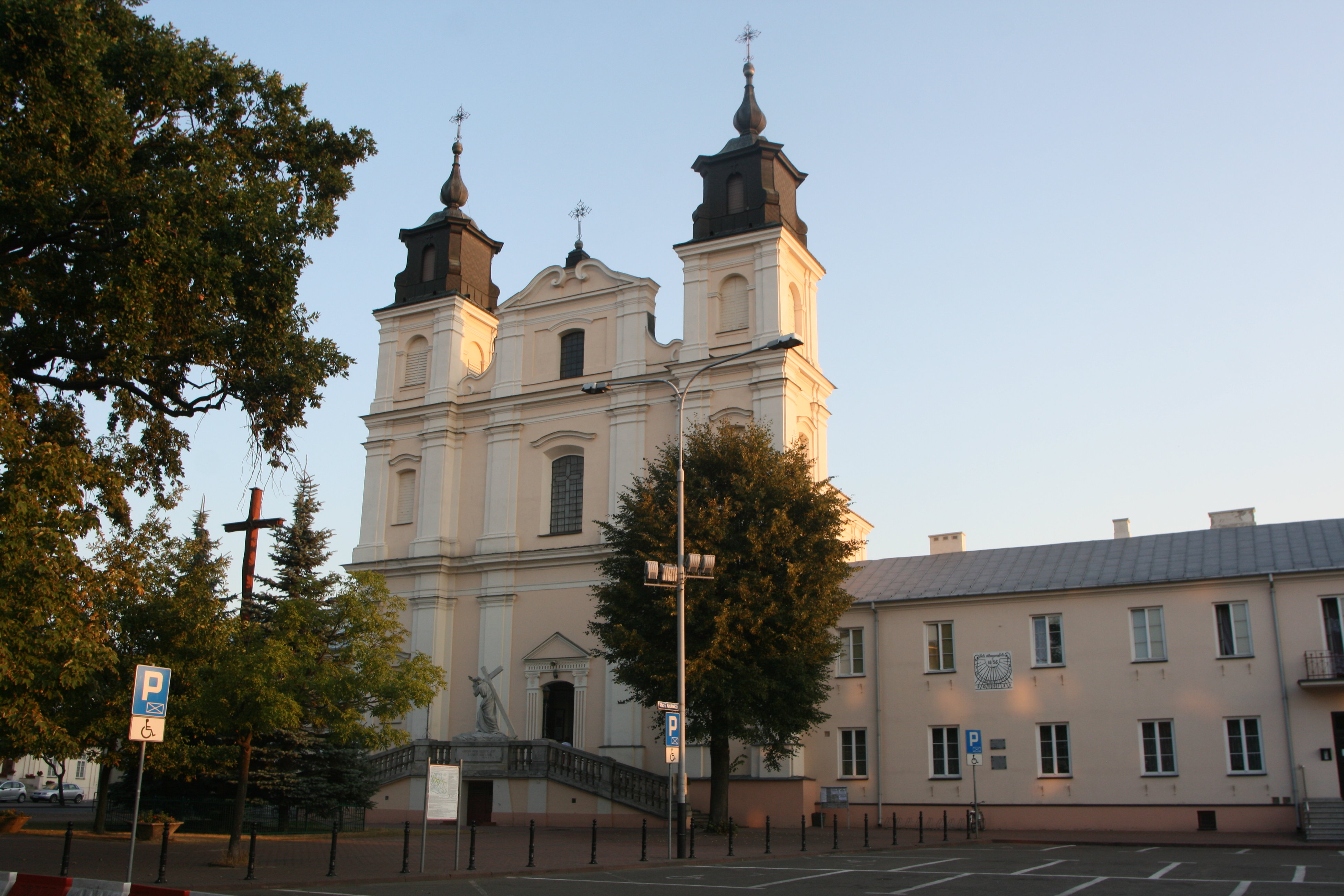 Łuków, Poland